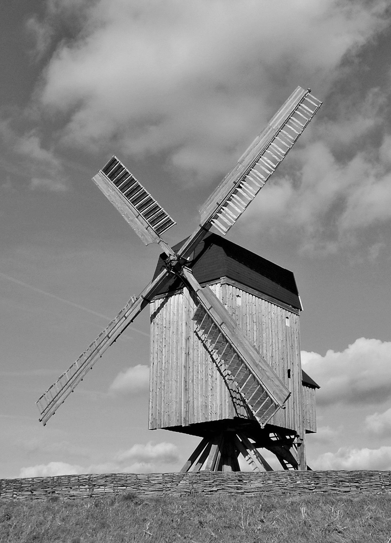 Die Windmühle wurde im Ort Wanzer umgesetzt. Zuvor stand sie in Pollitz.